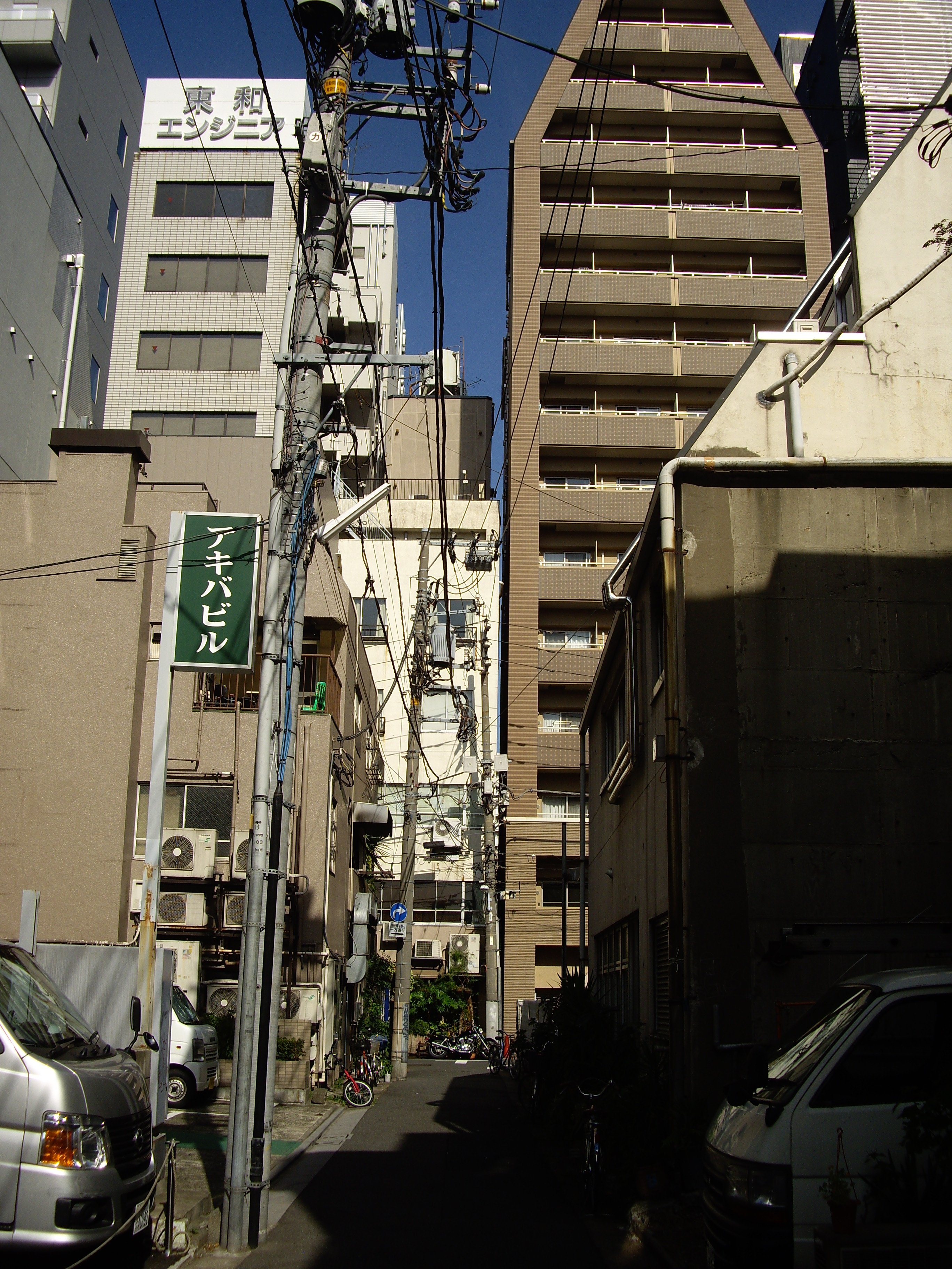 台東区秋葉原